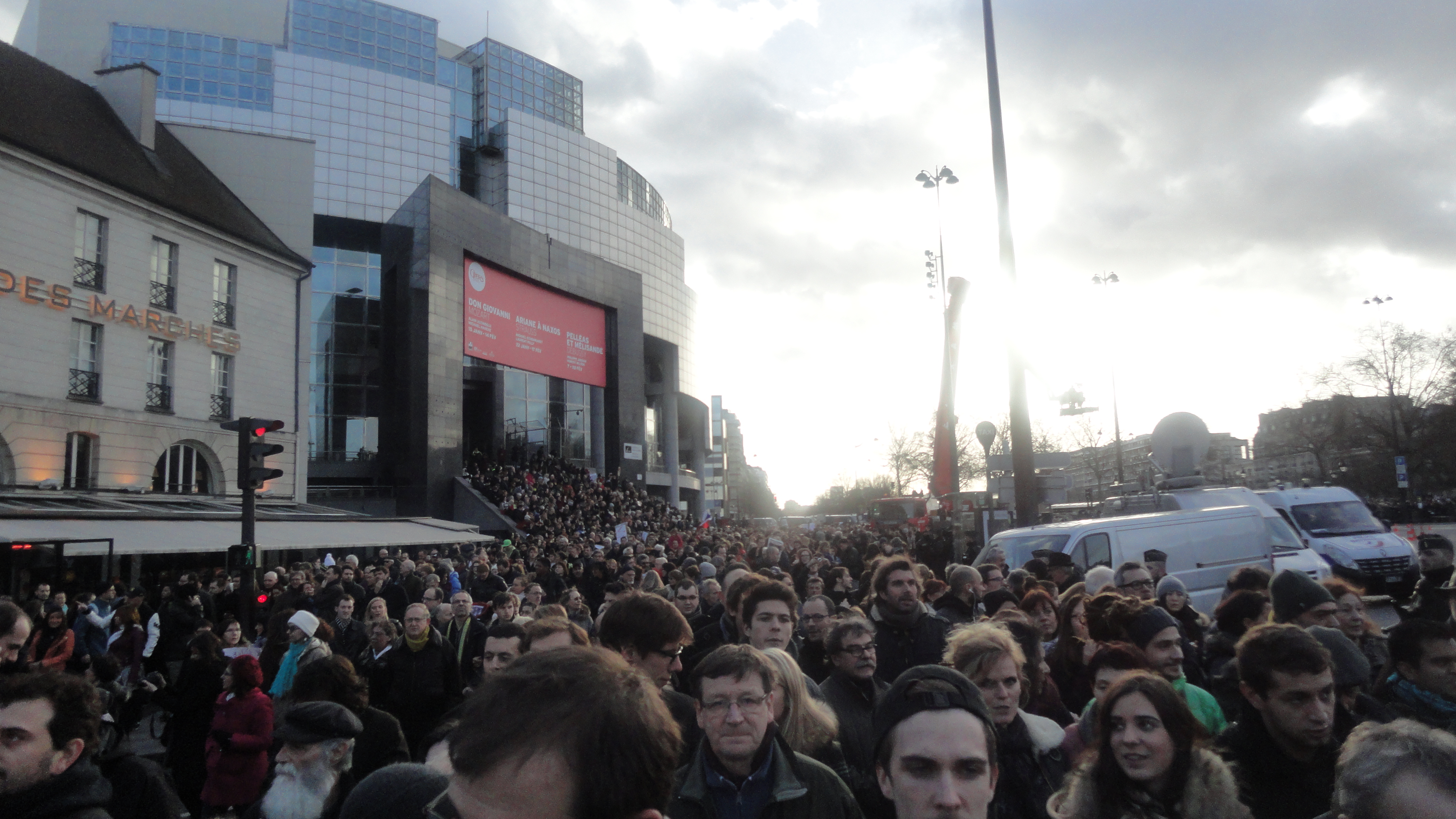 Je Suis Charlie 20150111 Paris Opéra Bastille